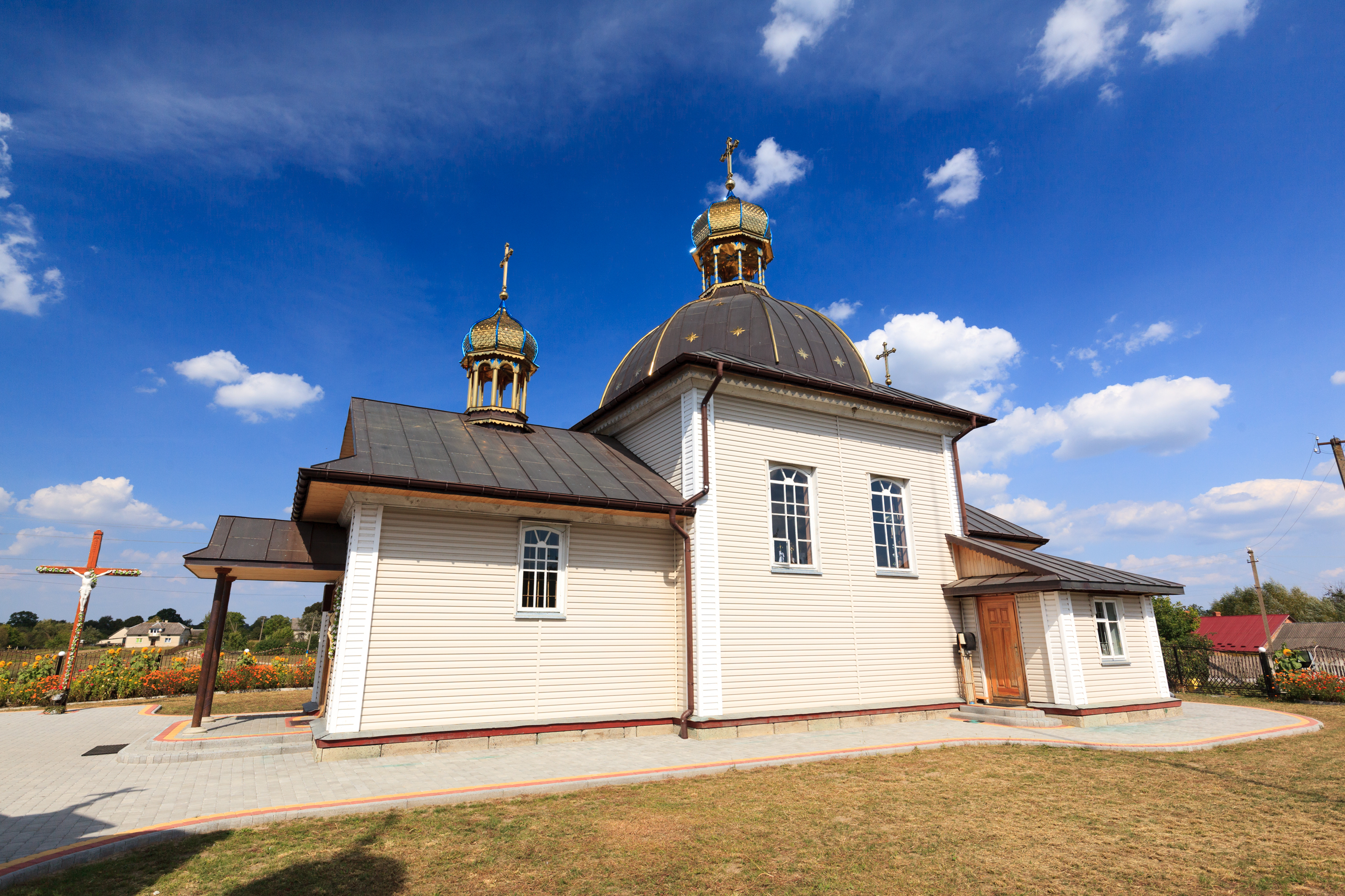 Церква Різдва Пресвятої Богородиці(дер.), с.Свидниця